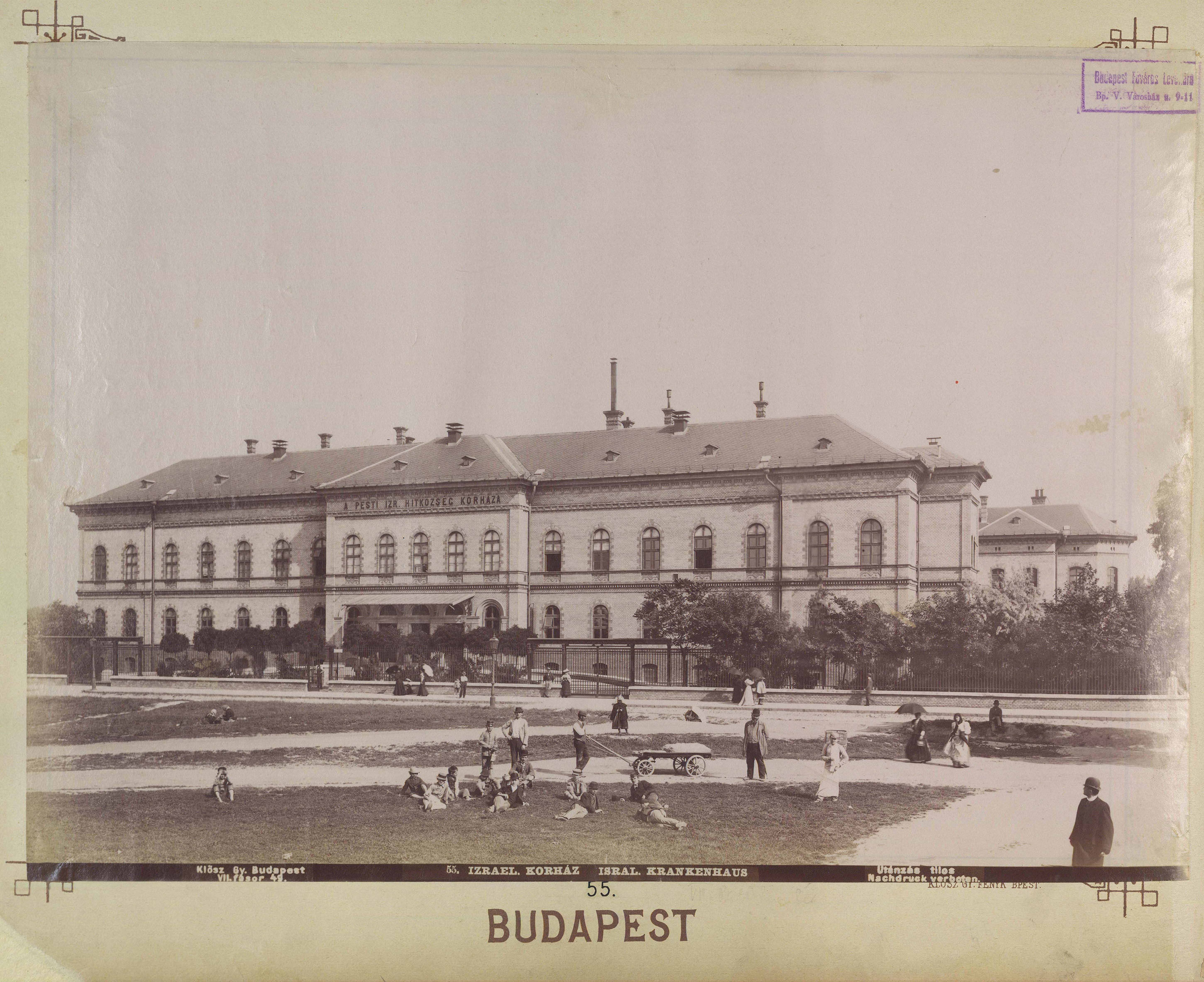 "Pesti Izraelita Hitközség kórháza. A felvétel 1890 után készült." A kép forrását kérjük így adja meg: Fortepan / Budapest Főváros Levéltára. Levéltári jelzet: HU.BFL.XV.19.d.1.07.056 Location: Hungary Tags: medical institution, Vilmos Freund-design